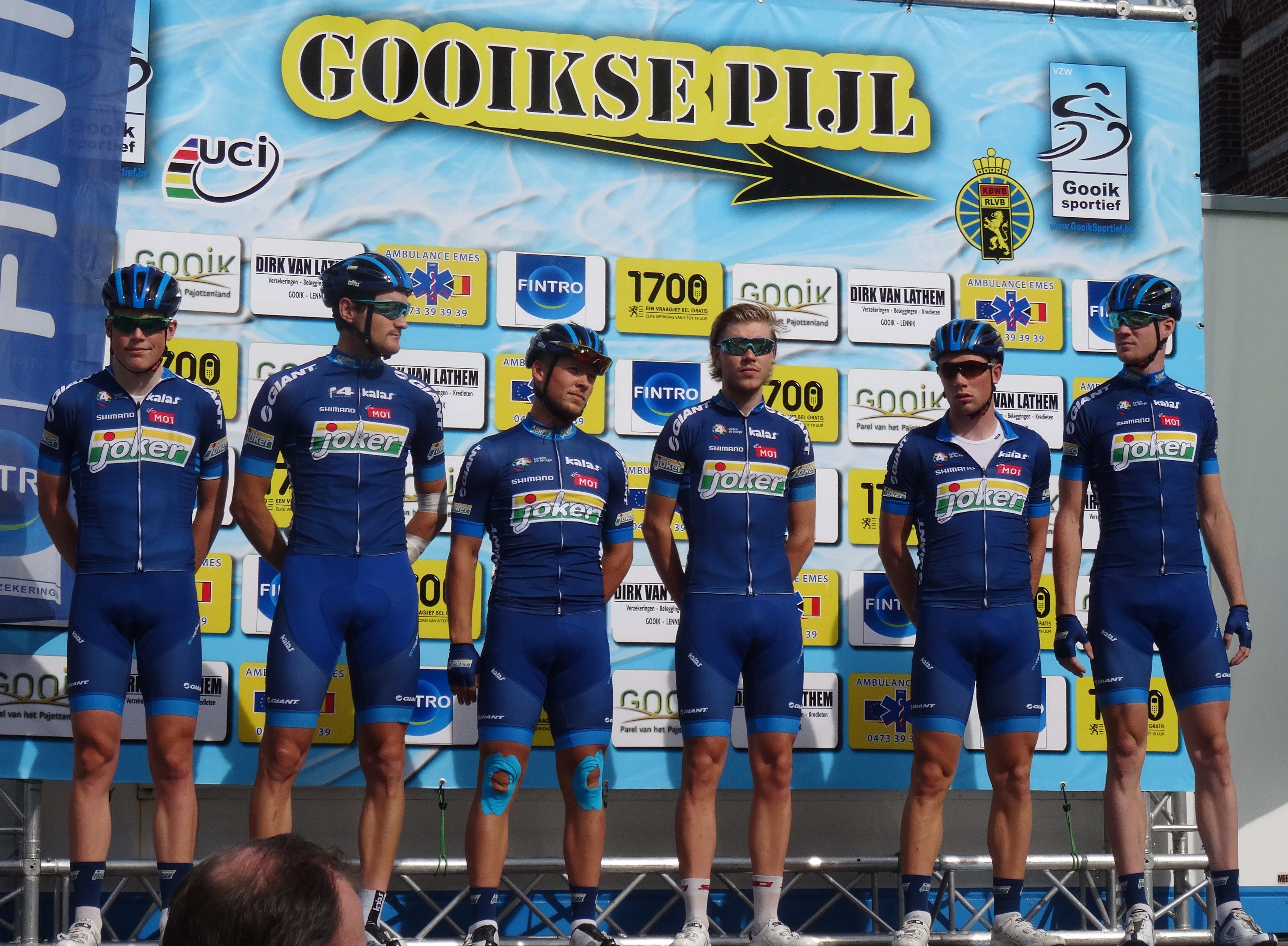 Reportage réalisé le dimanche 28 septembre à l'occasion du départ et de l'arrivée de la Gooikse Pijl 2014 à Gooik, Belgique.